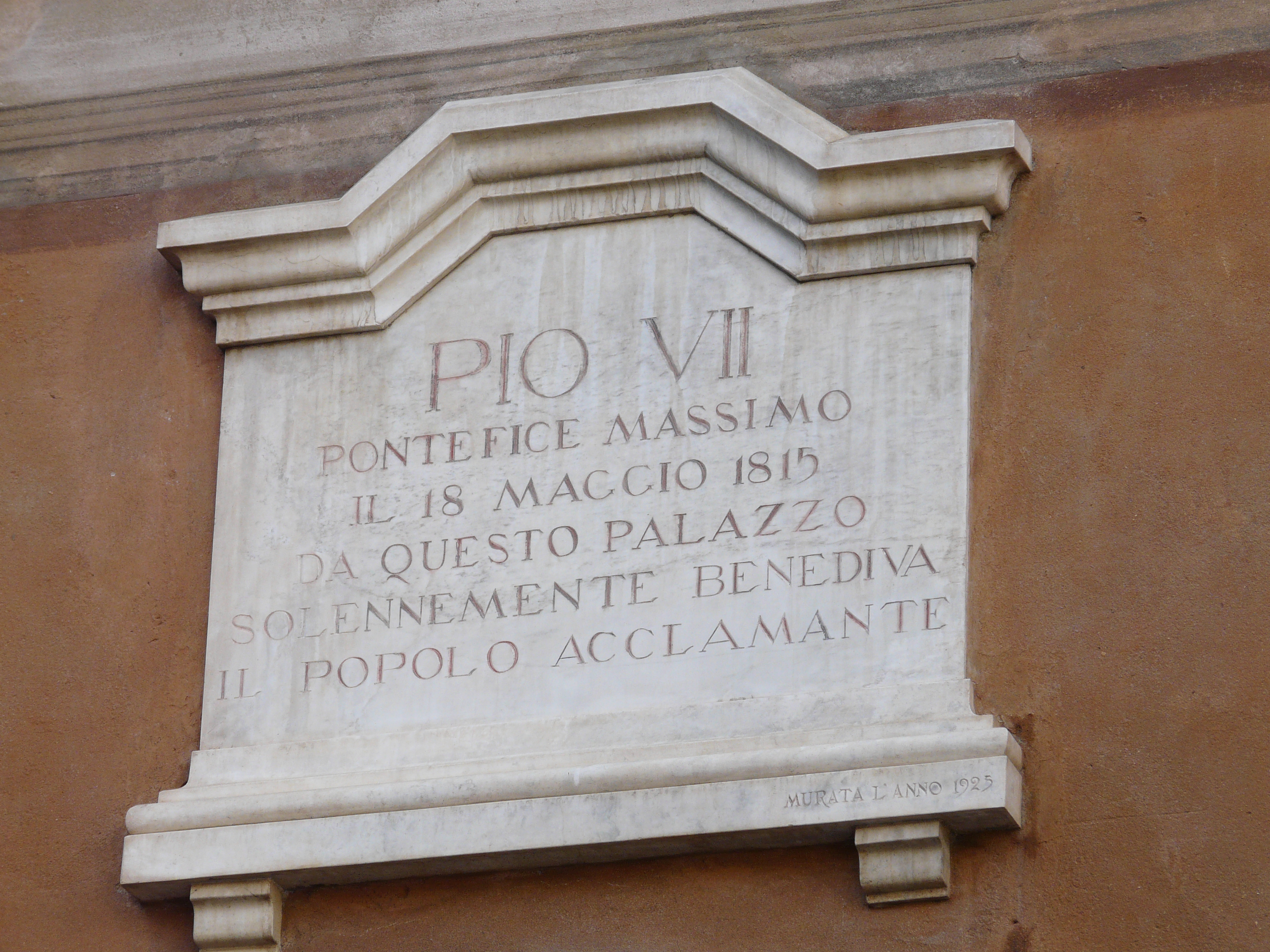 Palazzo Delle Piane (già Cambiaso Negrotto), Novi Ligure, Piemonte, Italia